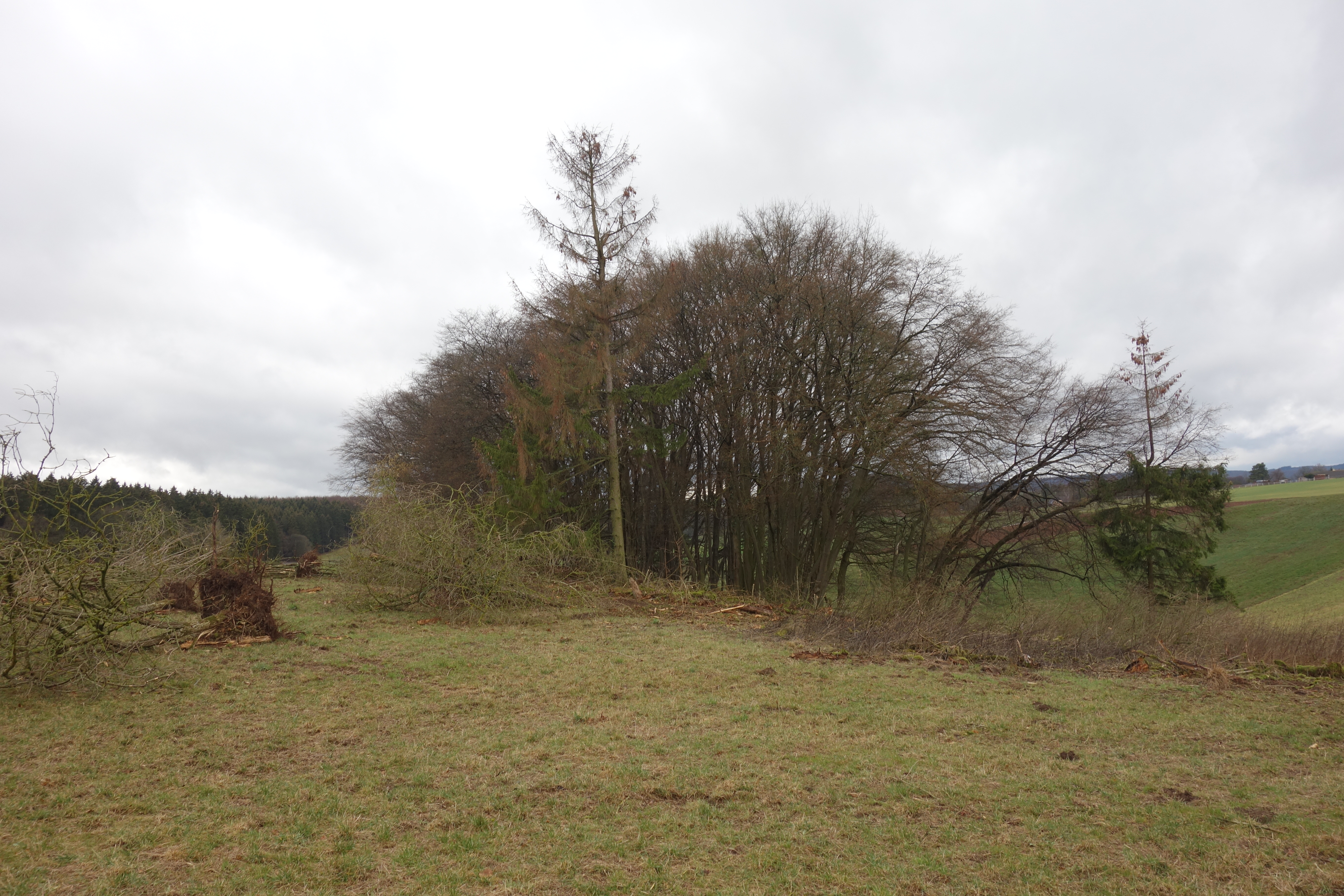 Naturdenkmal Schwalgloch Bohlen Kämpchen von Osten nach Rodung des östlichen Teils des NDs.